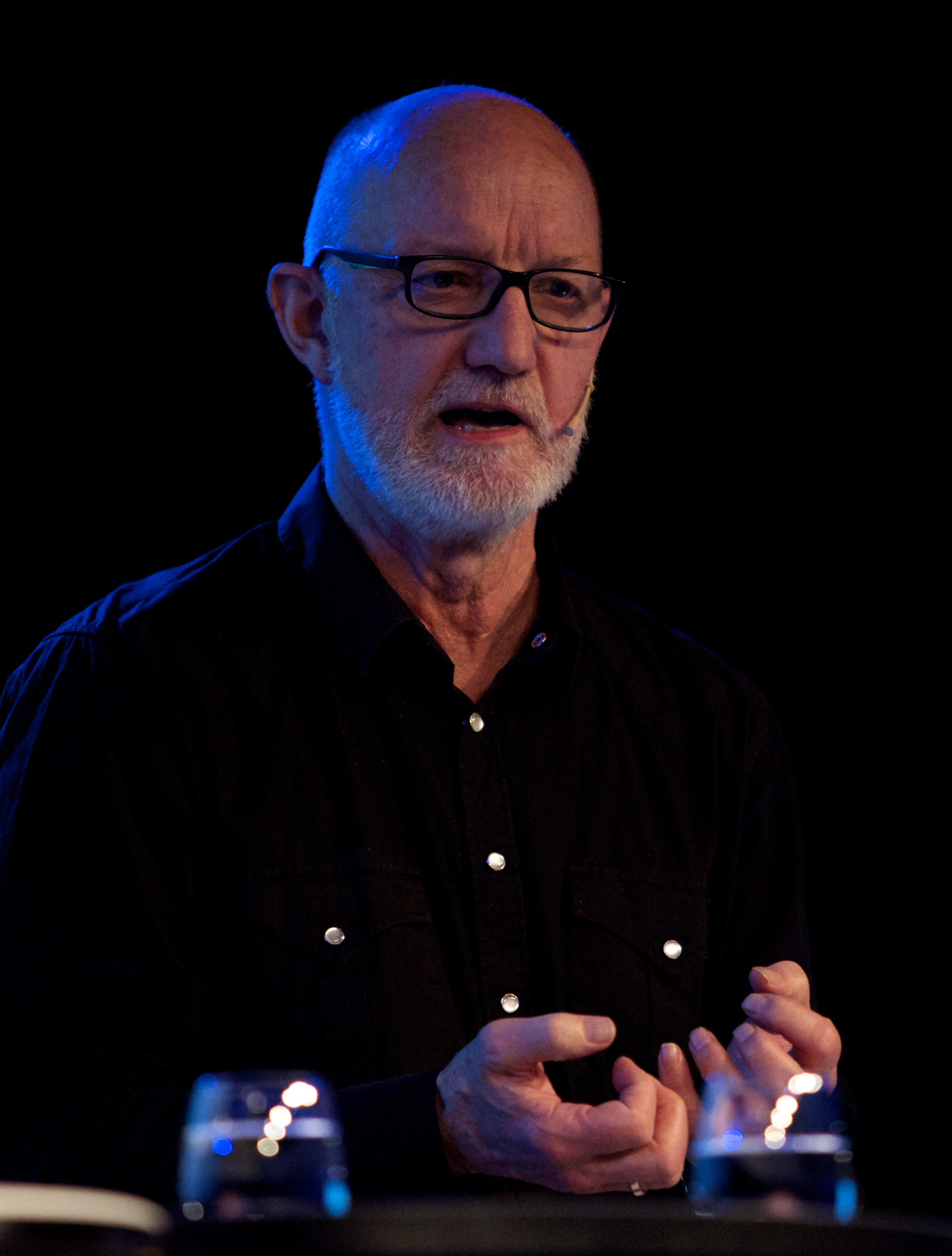 Sigurd Allern, UiO